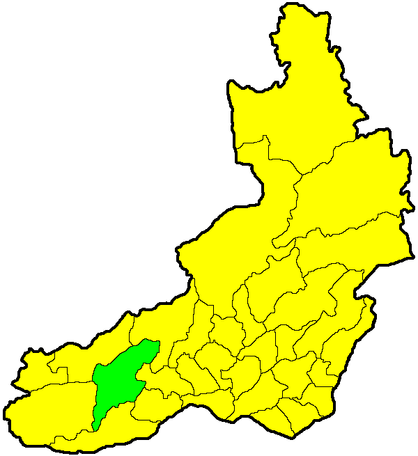 Улетовский район на карте Забайкальского края